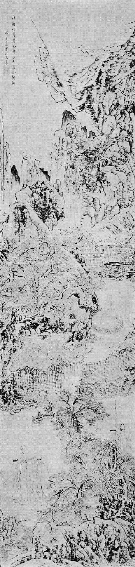 Lie Zi dans un paysage. Papier 191x46cm. Exécuté à Wuzhou. Daté du début de l'hiver 1843. Signé. Sceau rouge.